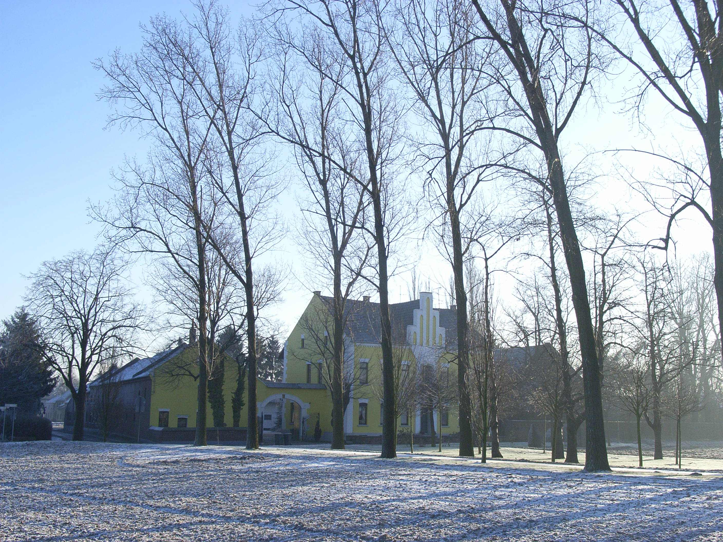 Hof mit Pappelallee am Ortsrand Spenrath